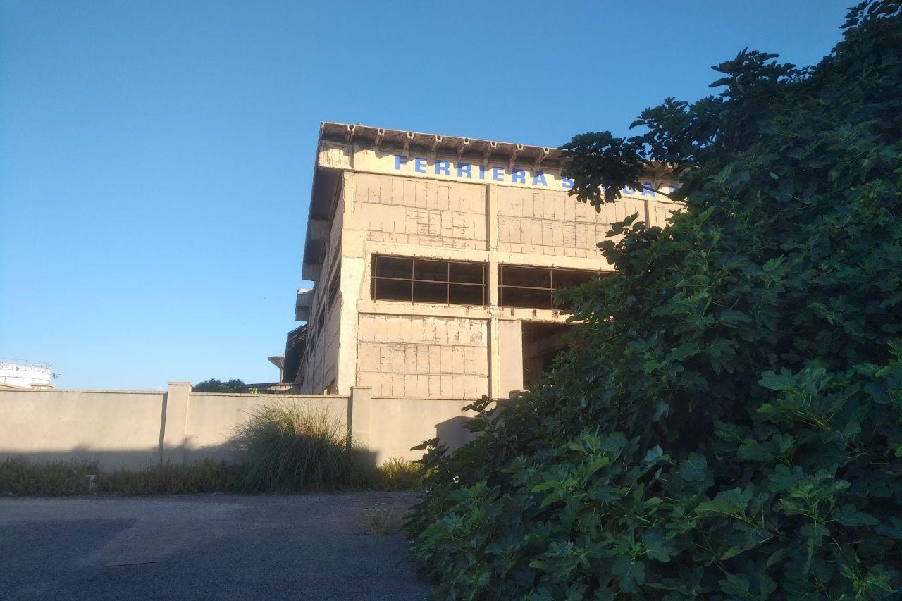 Ferriera sarda Porto Torres, piazza d'ingresso cortile nord (area uffici).